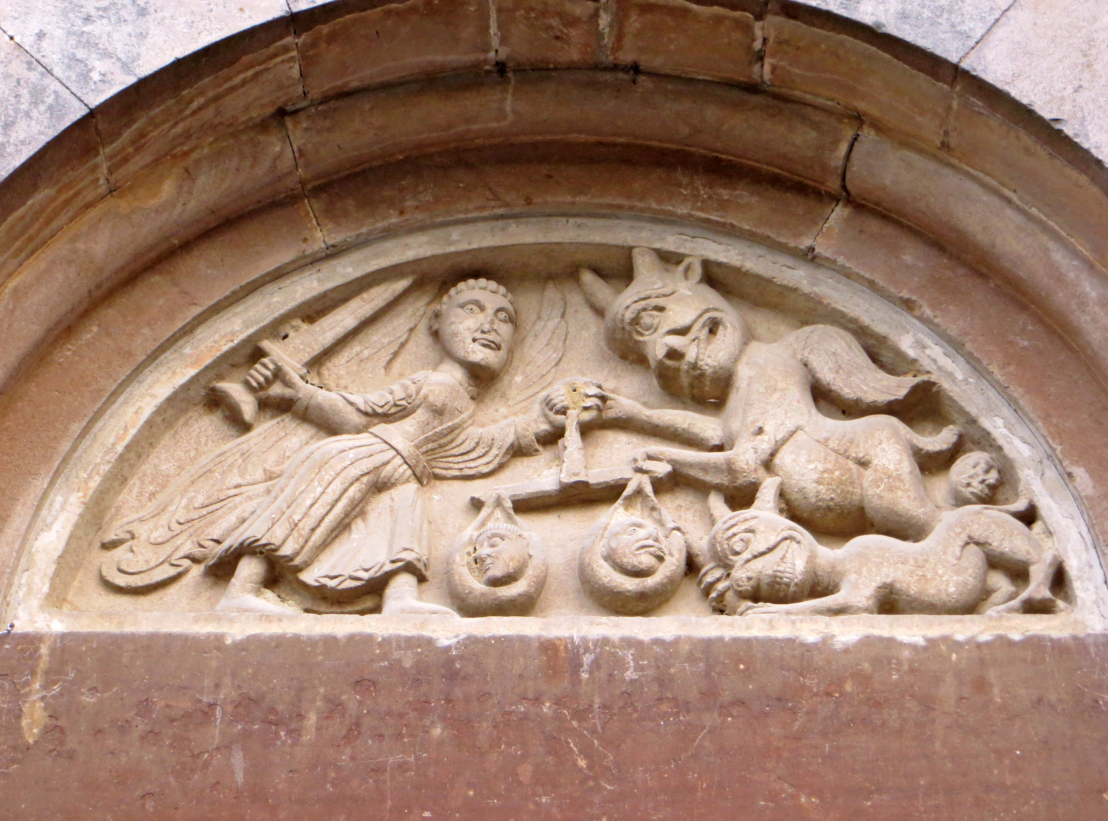 Lunetta della Psicostasia sul portale d'ingresso della pieve di San Biagio This is a photo of a monument which is part of cultural heritage of Italy.